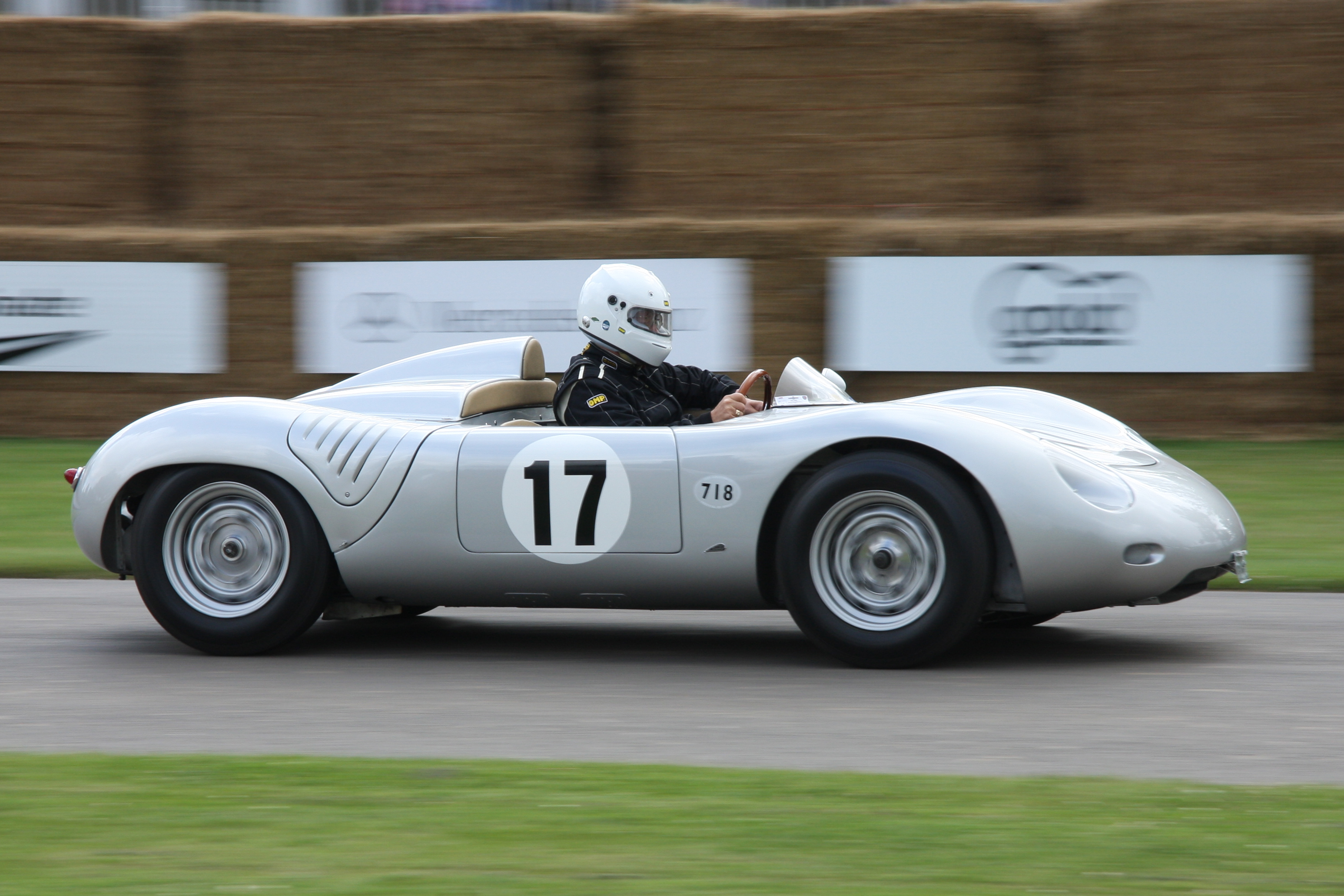 Built 1958. 1.6 litre flat 4